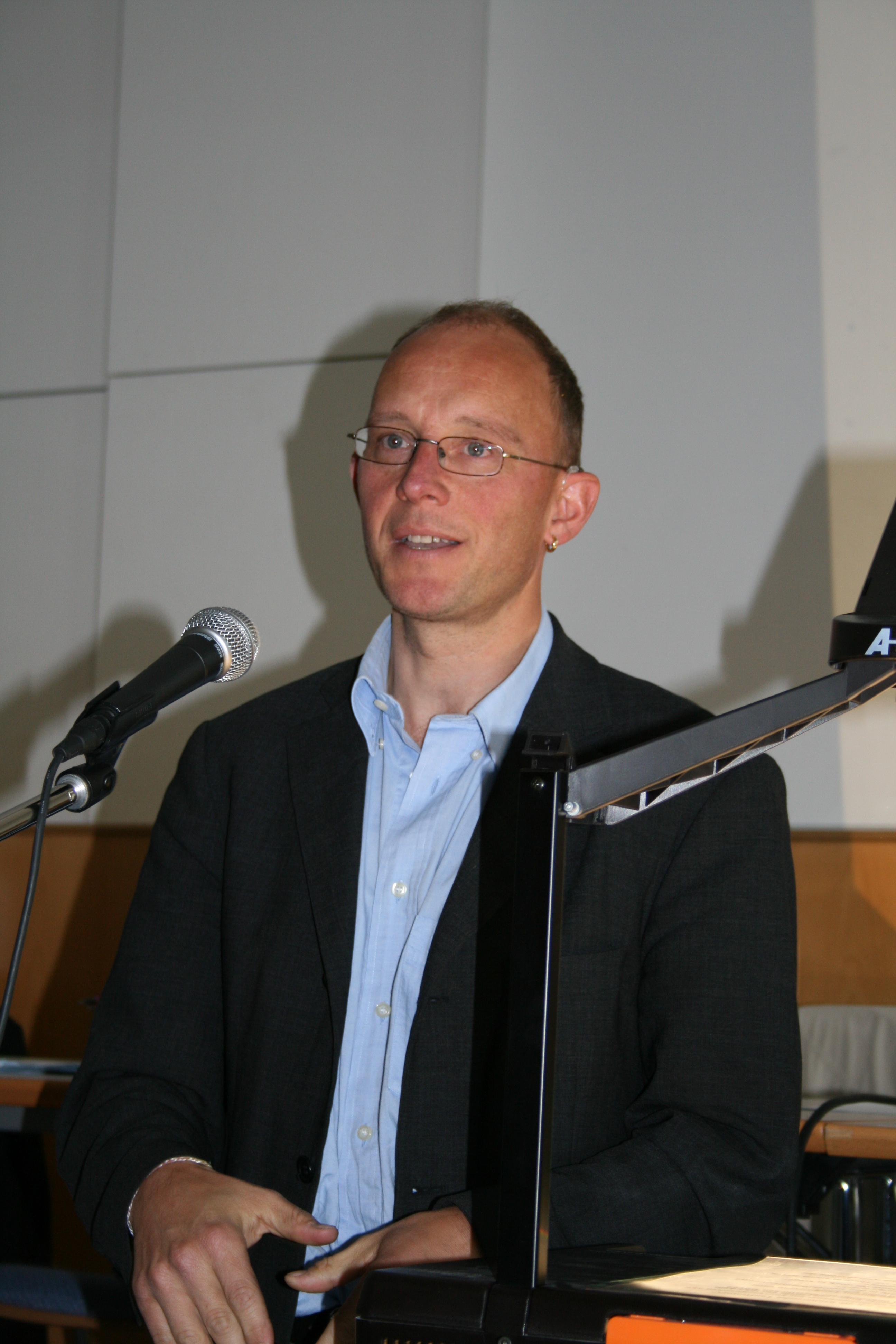 Ralph Kunz, praktischer Theologe, Universität Zürich, Switzerland, bei einem Vortrag vor dem Aargauer Pfarrkapitel in Oberentfelden